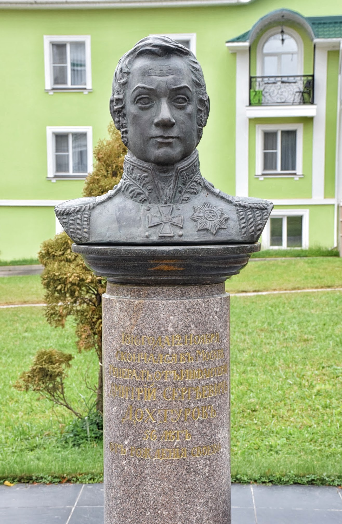 Могила Дохтурова Дмитрия Сергеевича (1756-1816), генерала, участника Отечественной войны 1812 года: территория монастыря Давыдова Пустынь, Новый Быт, Чеховский район, Московская область